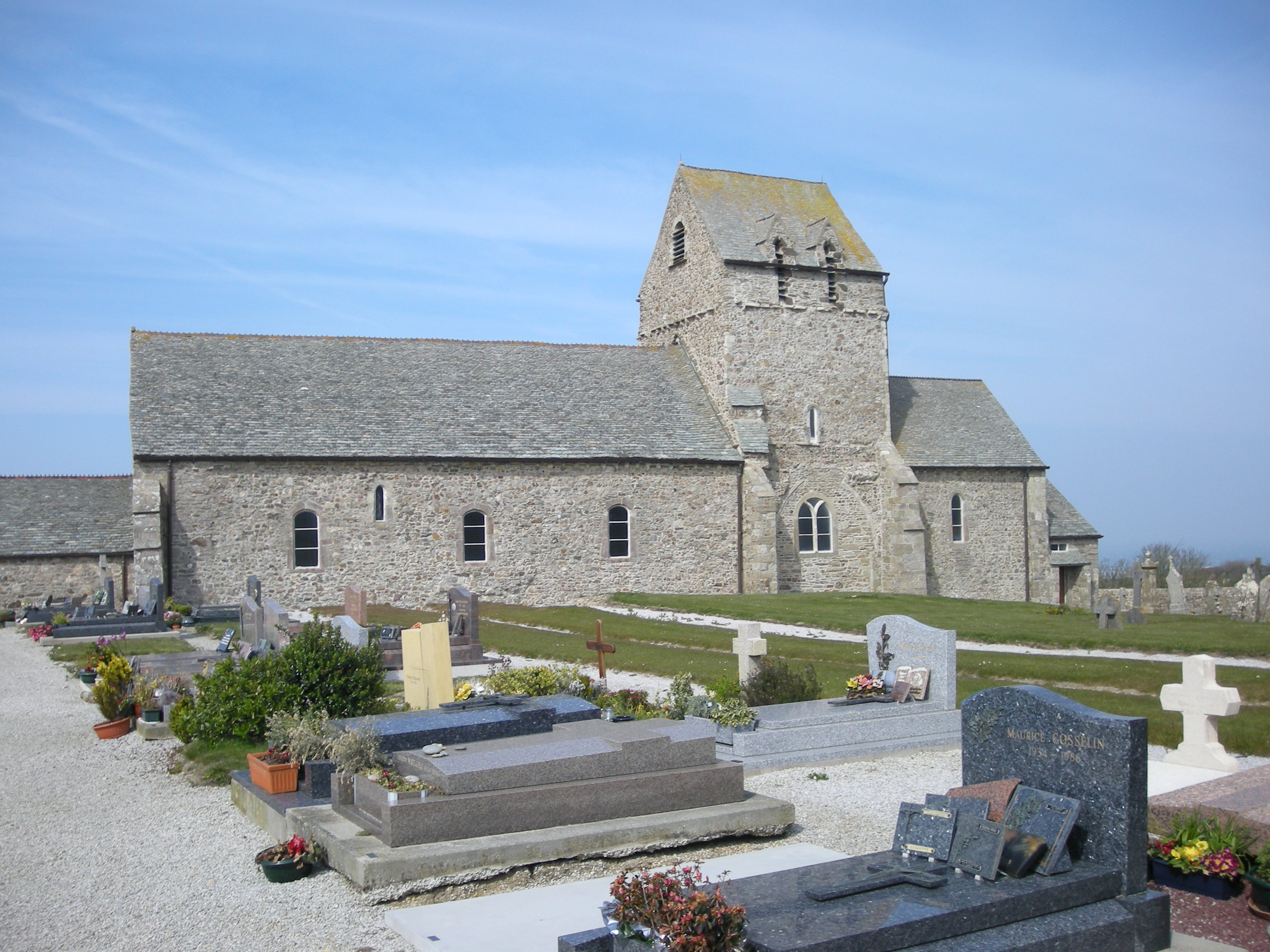 Eglise de Jobourg (Manche, Normandie, France)